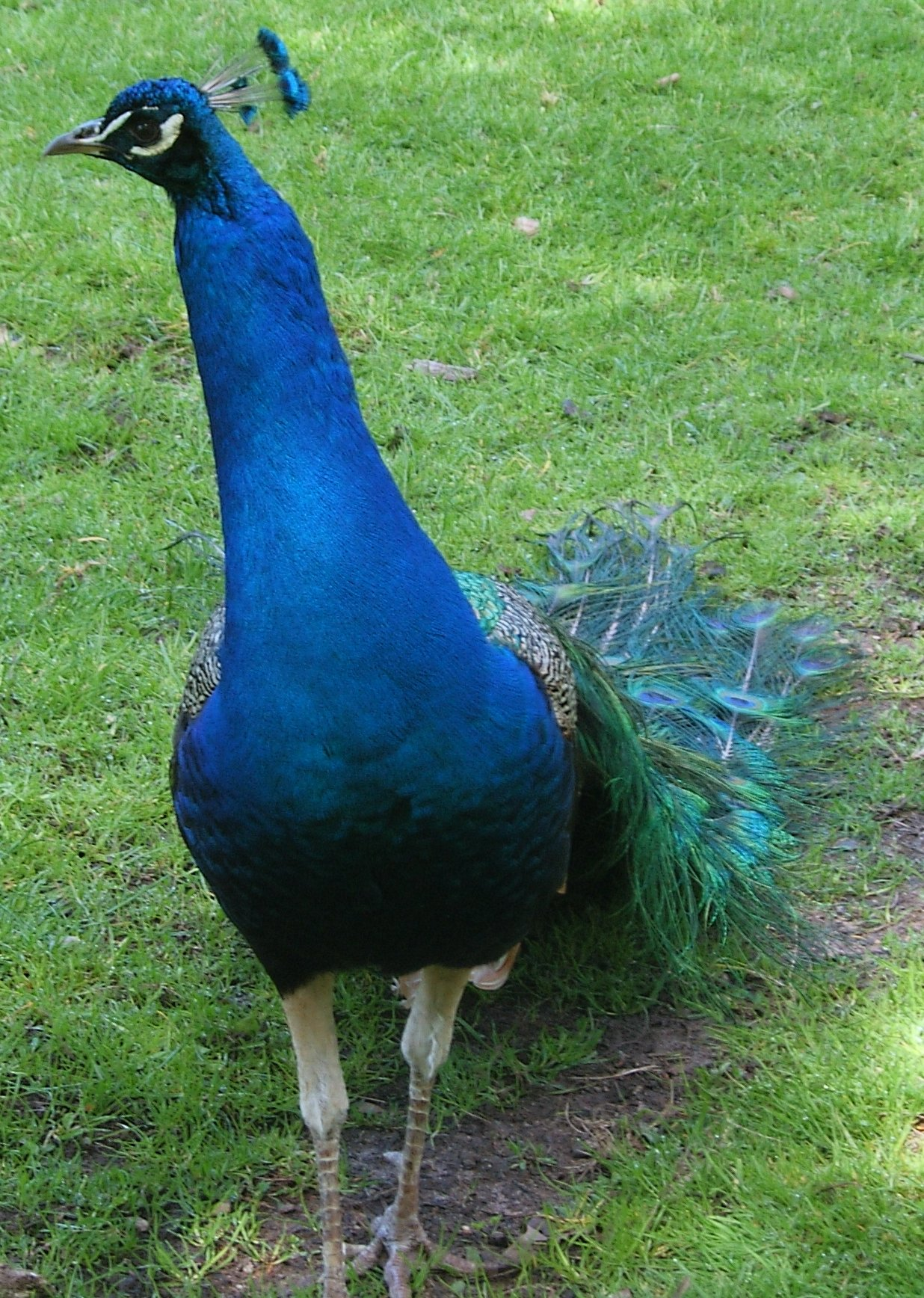 Hamburg, Blankenese, Hirschpark, Pfau This is a photograph of an architectural monument. ,16979